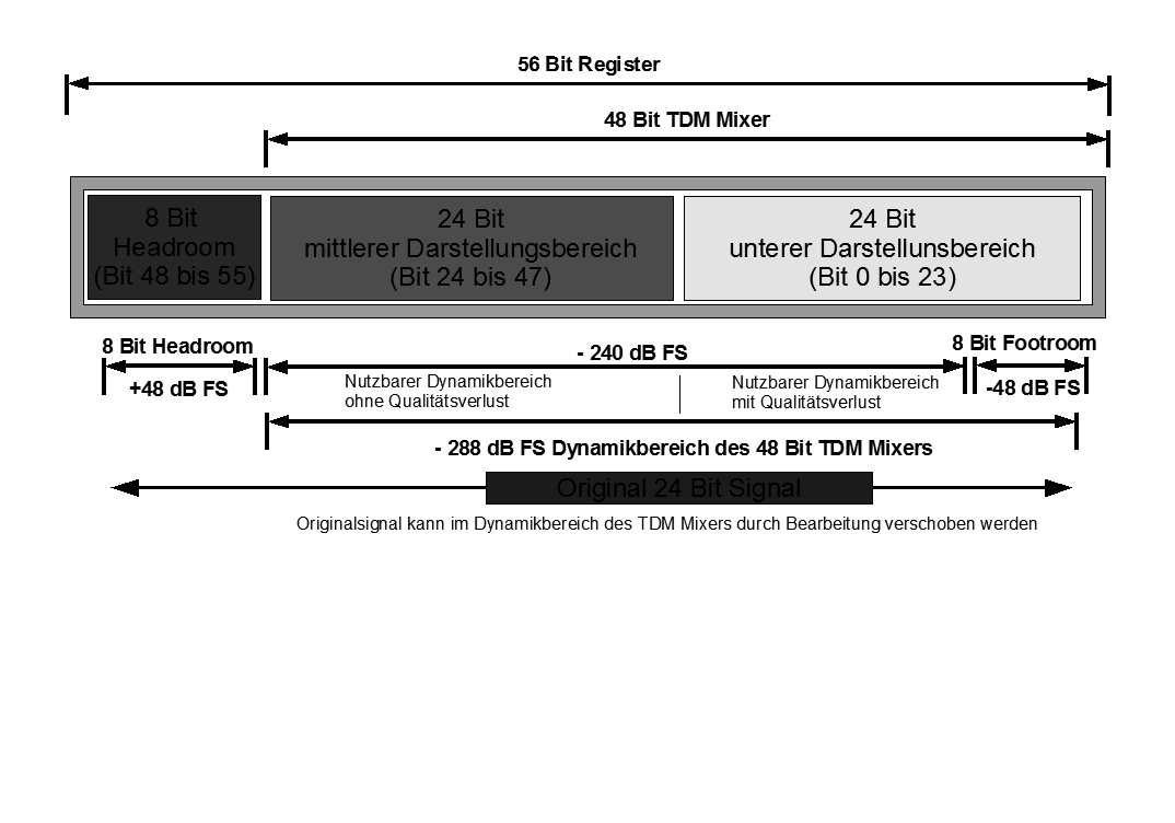 Signaldynamikbereich eines 48 Bit Mixers